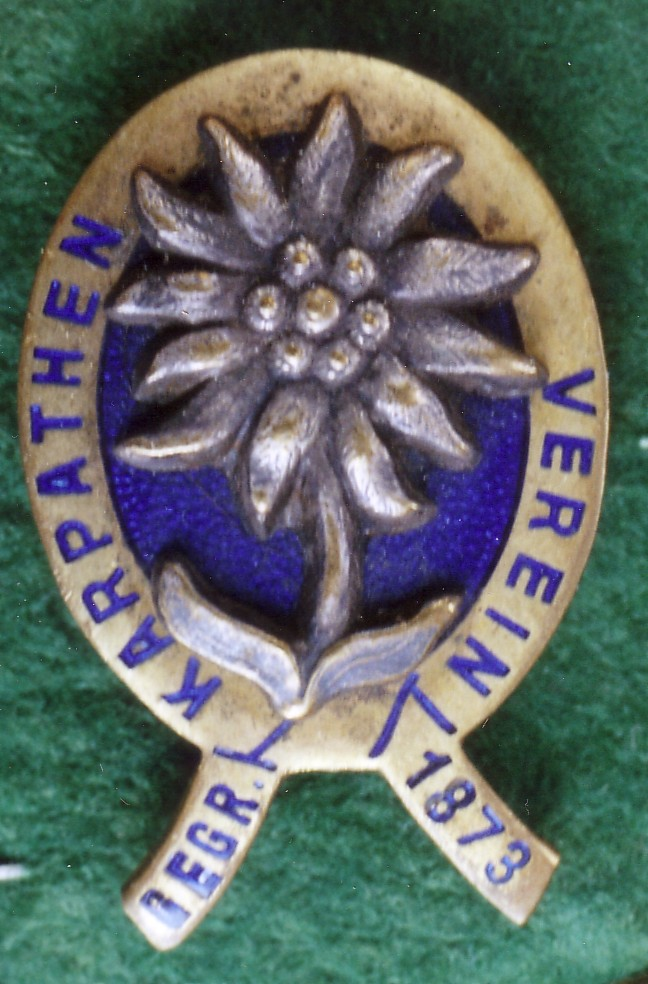 Ungarischer Karpathenverein, gegründet 1873